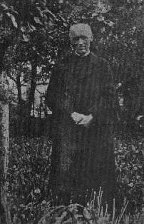 Leopold Škarek (1874 - 1968), Český římskokatolický kněz.